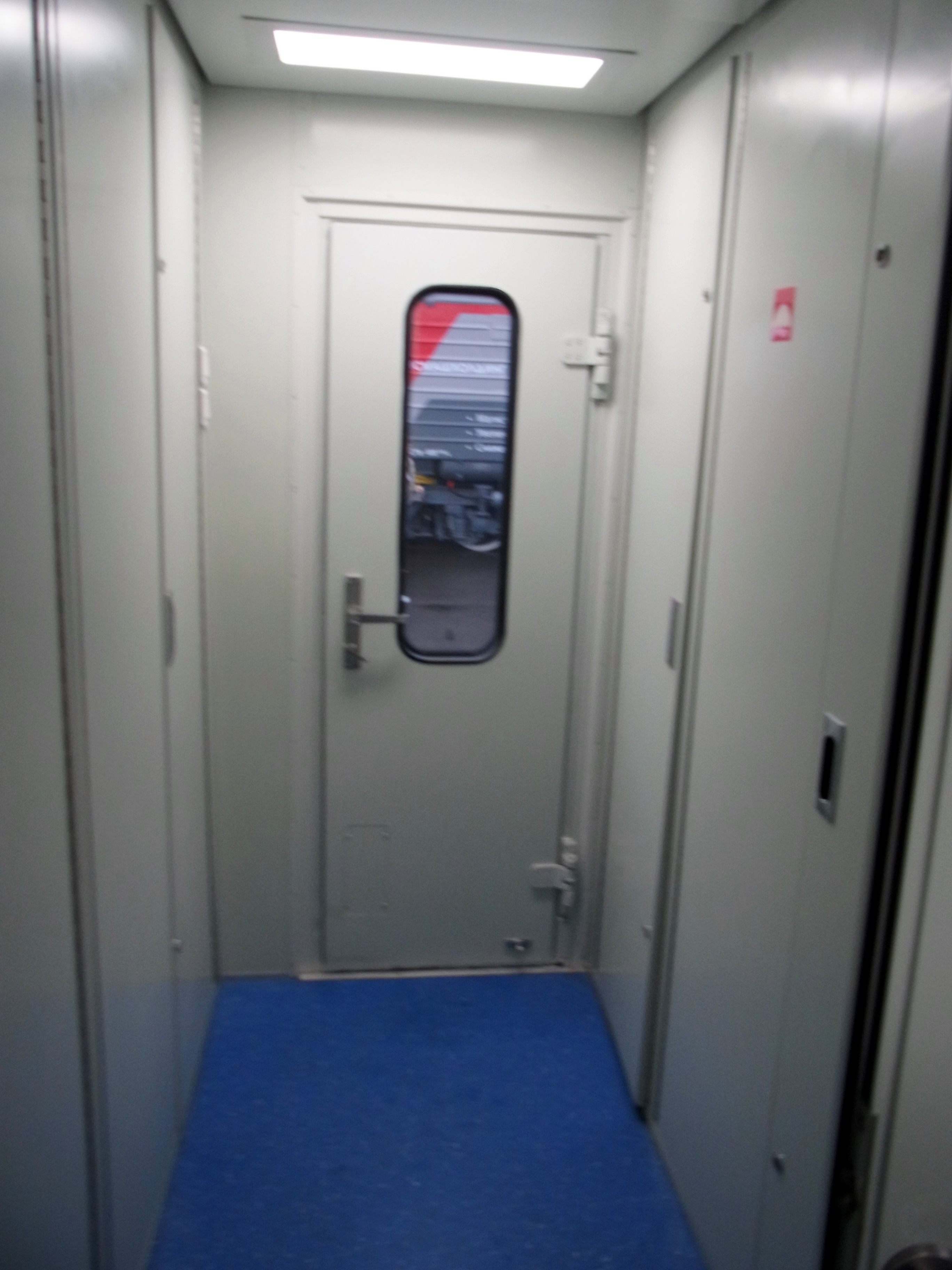 Служебный тамбур машиниста в головном вагоне электропоезда ЭГ2Тв-001